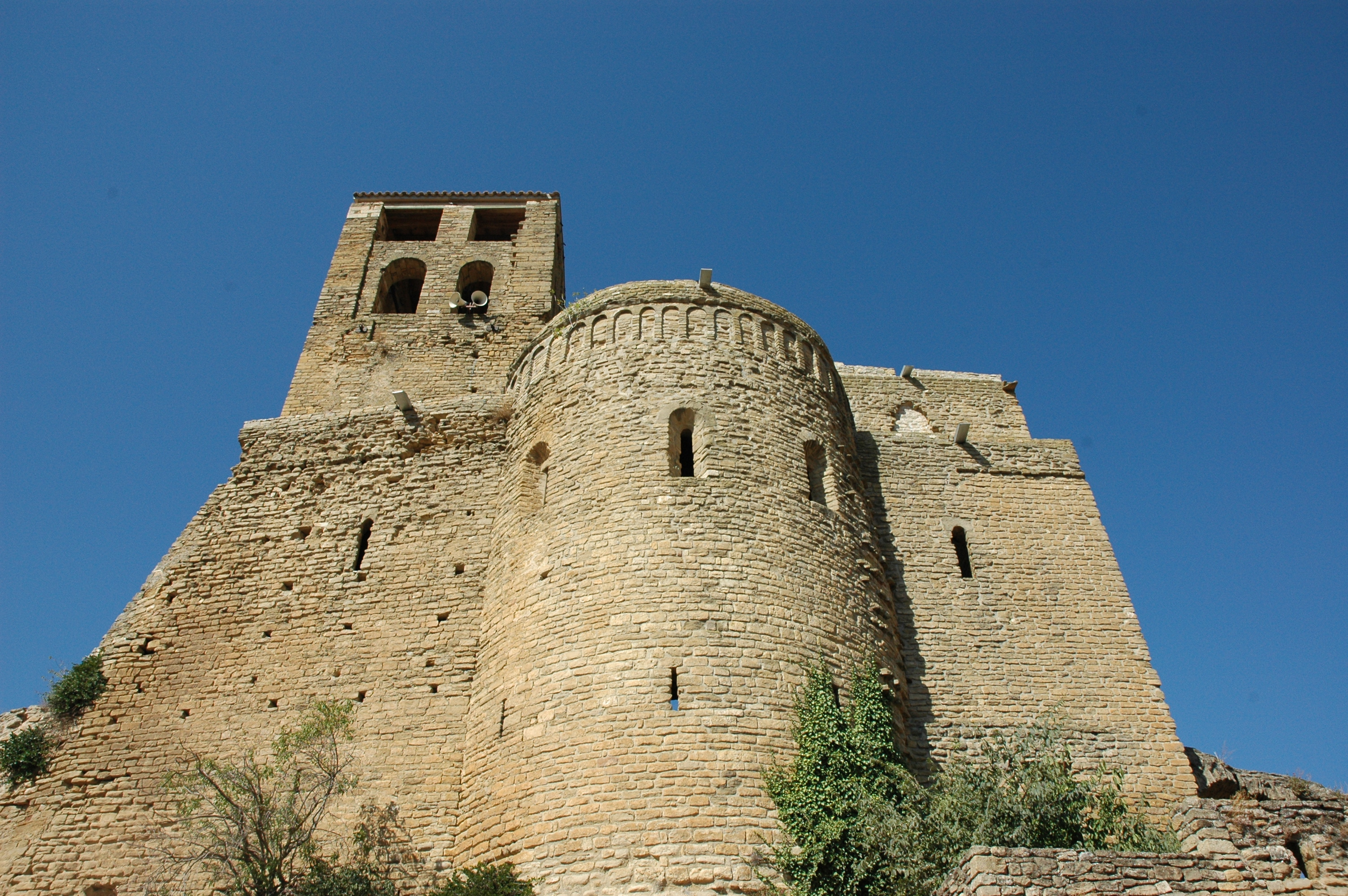 Sant Pere d'Àger